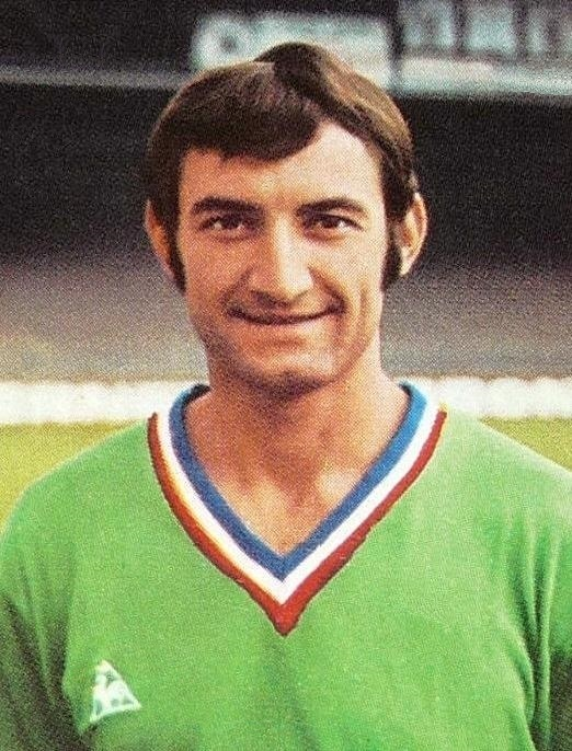 Gérard Farison en 1970, Ageducatifs Football 1970 - 1971', Panini figurina n°232.